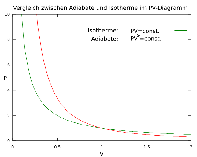 Vergleich von Adiabate und Isotherme im PV-Diagramm für ein ideales Gas: Adiabate: P ⋅ V 5 3 = c o n s t . {\displaystyle P\cdot V^{5 \over 3}=const.} d S = 0 {\displaystyle dS=0} und C V = c o n s t . {\displaystyle C_{V}=const.} Isotherme: P ⋅ V = n ⋅ R ⋅ T = c o n s t . {\displaystyle P\cdot V=n\cdot R\cdot T=const.}